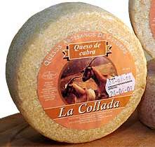 Queso de cabra La Collada